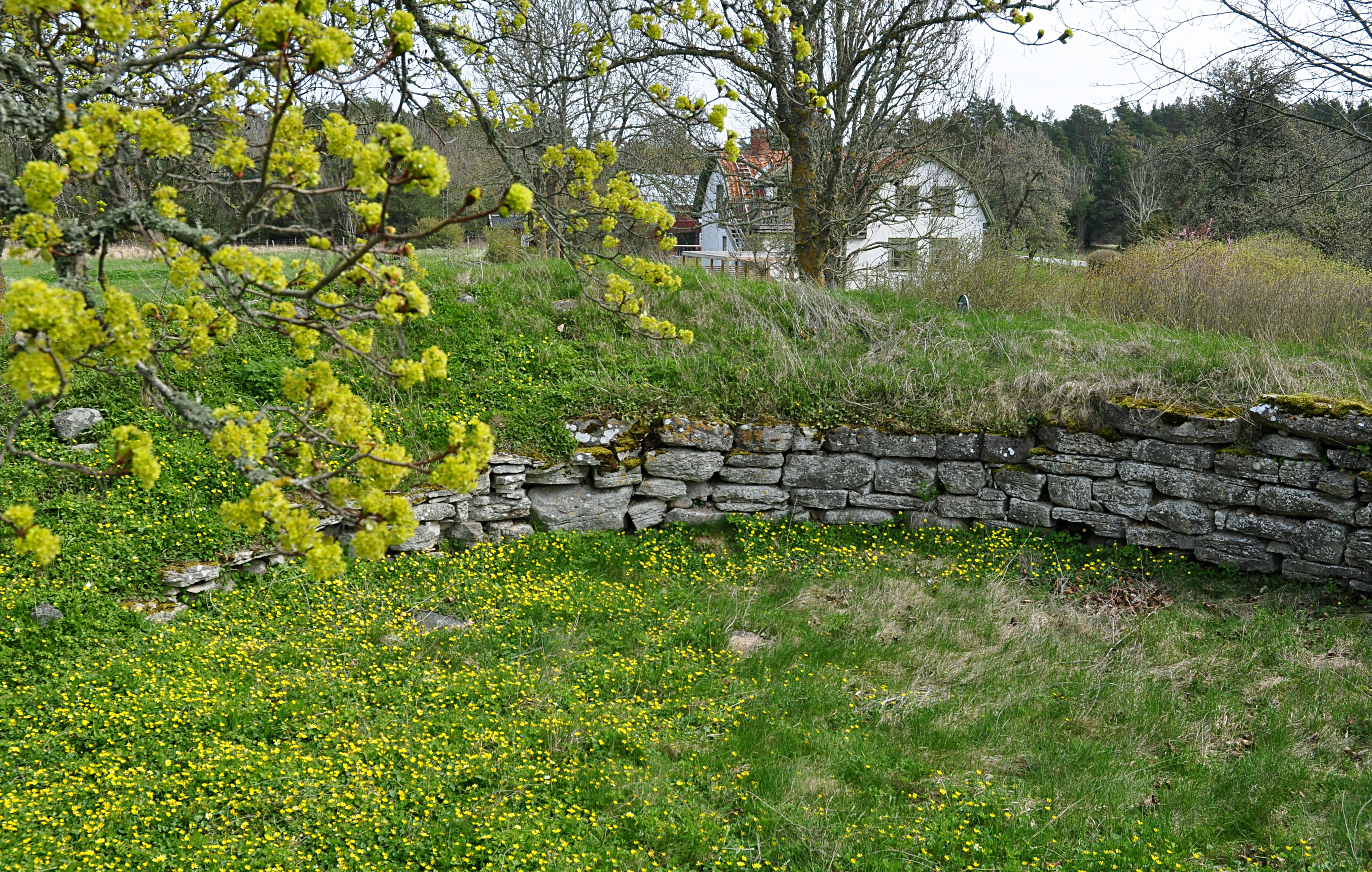 Västergarns kyrka (Västergarn Kyrkogården 1:1). Ruin invid Västergarns kyrka av en gammal kastal, Gotland.